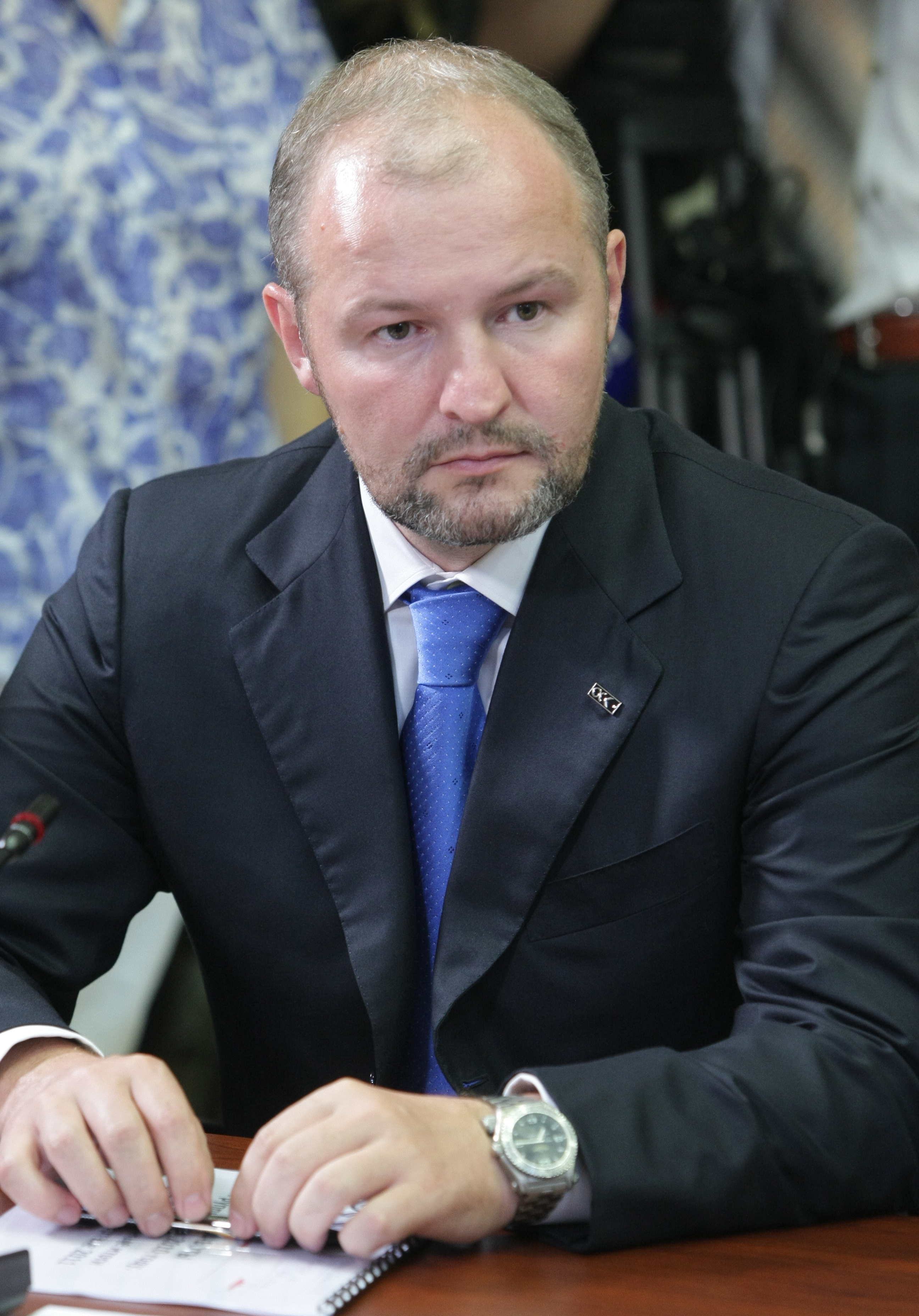 Президент «Объединенной судостроительной корпорации» («ОСК») Р. В. Троценко на совещании по вопросу размещения гособоронзаказа